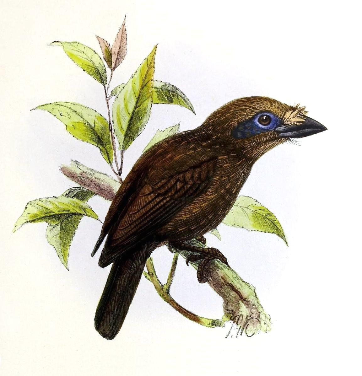 GYMNOBUCCO BONAPARTEI.